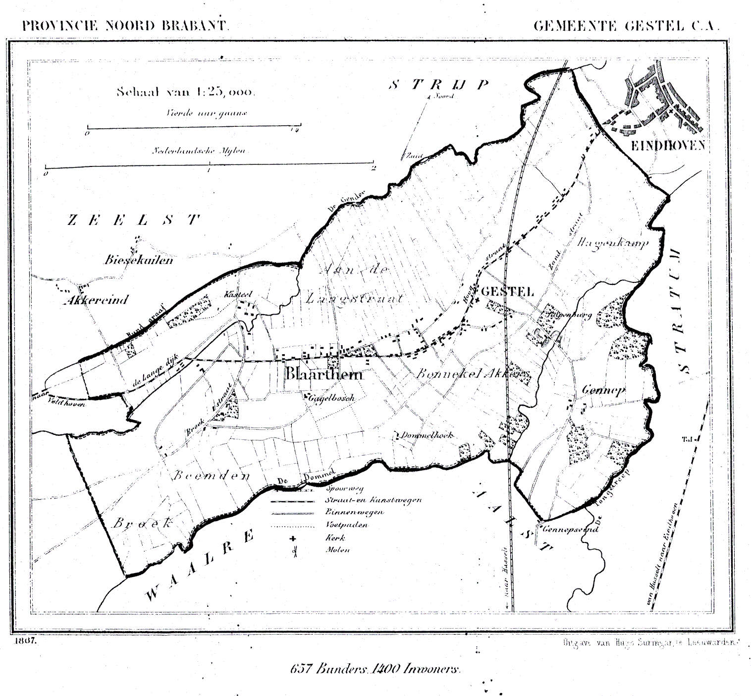 Nederland, Noord-Brabant, Gemeente Gestel